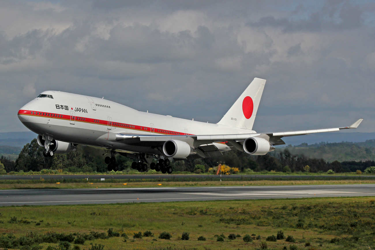 Boeing 747 da Forza Aérea de Xapón usado polo príncipe Naruhito na súa visita a Santiago de Compostela.